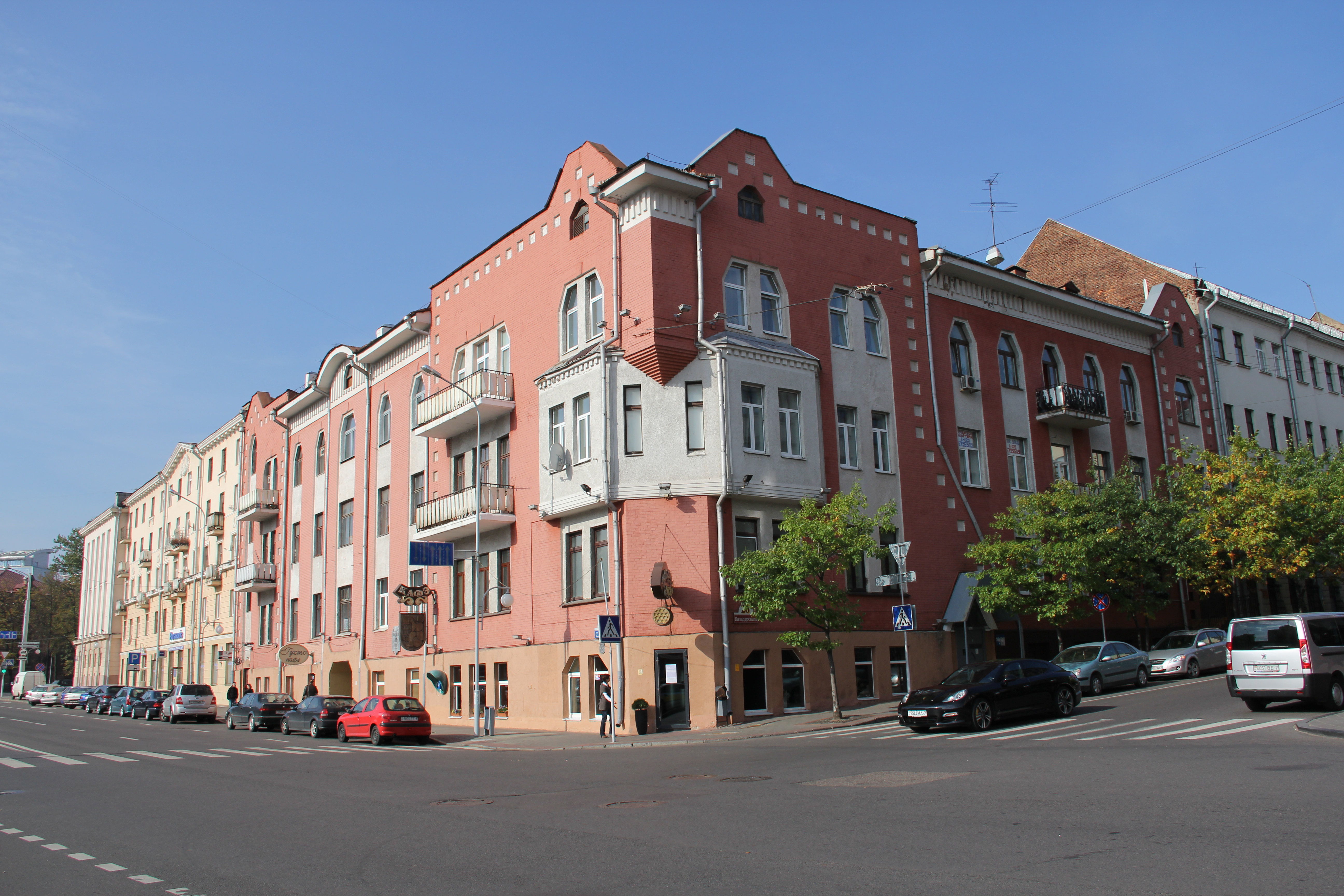 Беларуская (тарашкевіца): Будынак былога ўпраўленьня Лібава-Роменскай чыгункі. г. Менск This is a photo of Belarusian heritage monument. Reference number: 713Г000070 ( WLM)